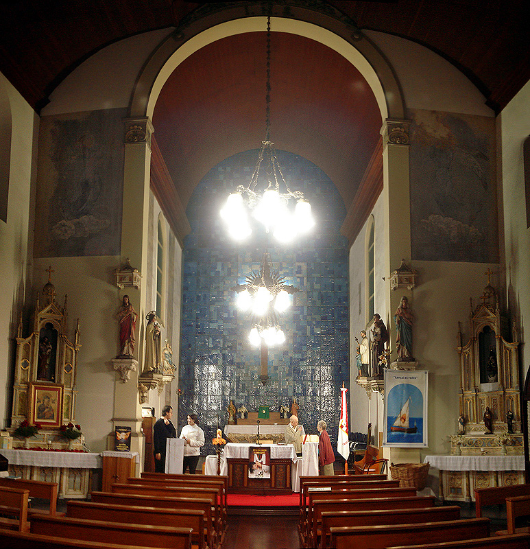 Interior da Capela Nosso Senhor Jesus do Bom Fim, Porto Alegre, Brasil.